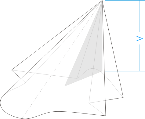 Obrazok je odo mna a davam ho wikipedii na volne pouzitie